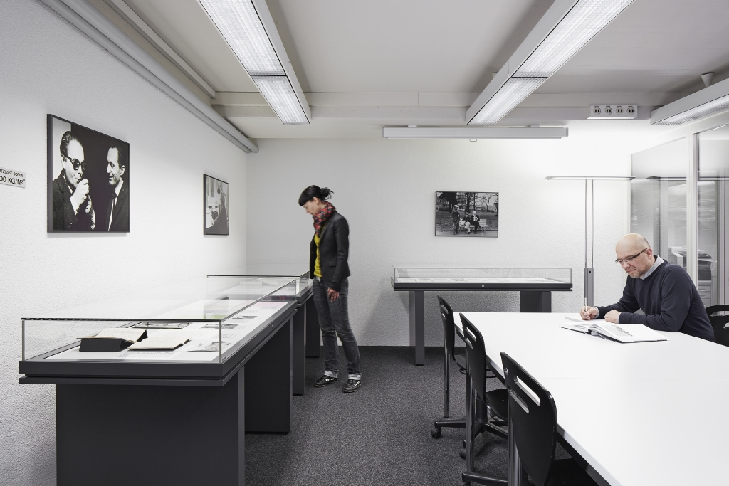 Max Frisch-Archiv Leesesaal